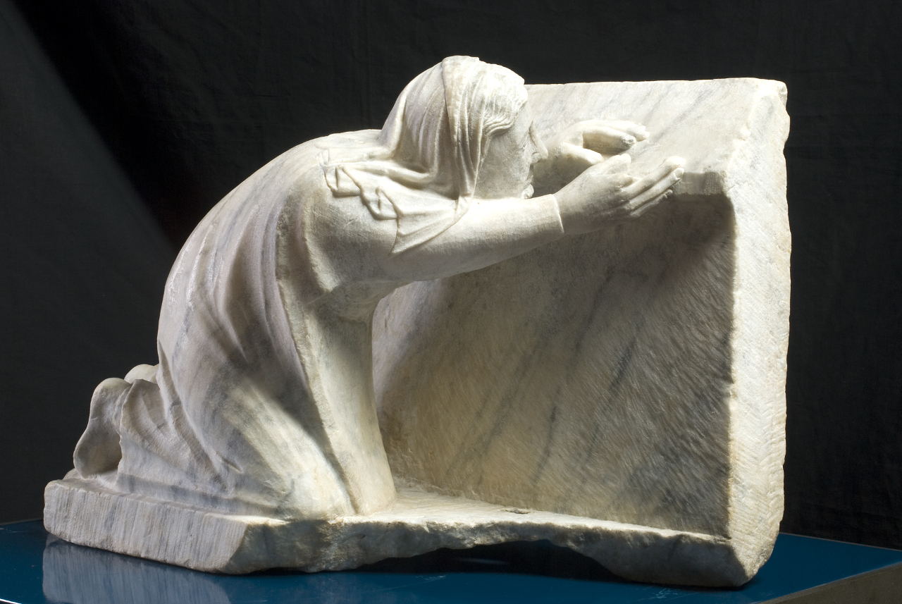 Scultura della cosiddetta "Assetata"